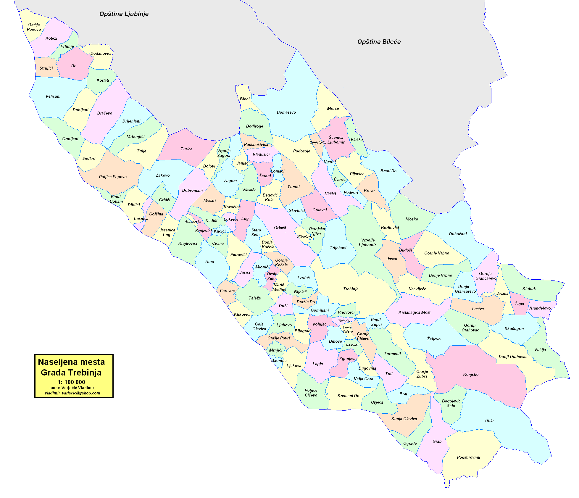 Grad Trebinje